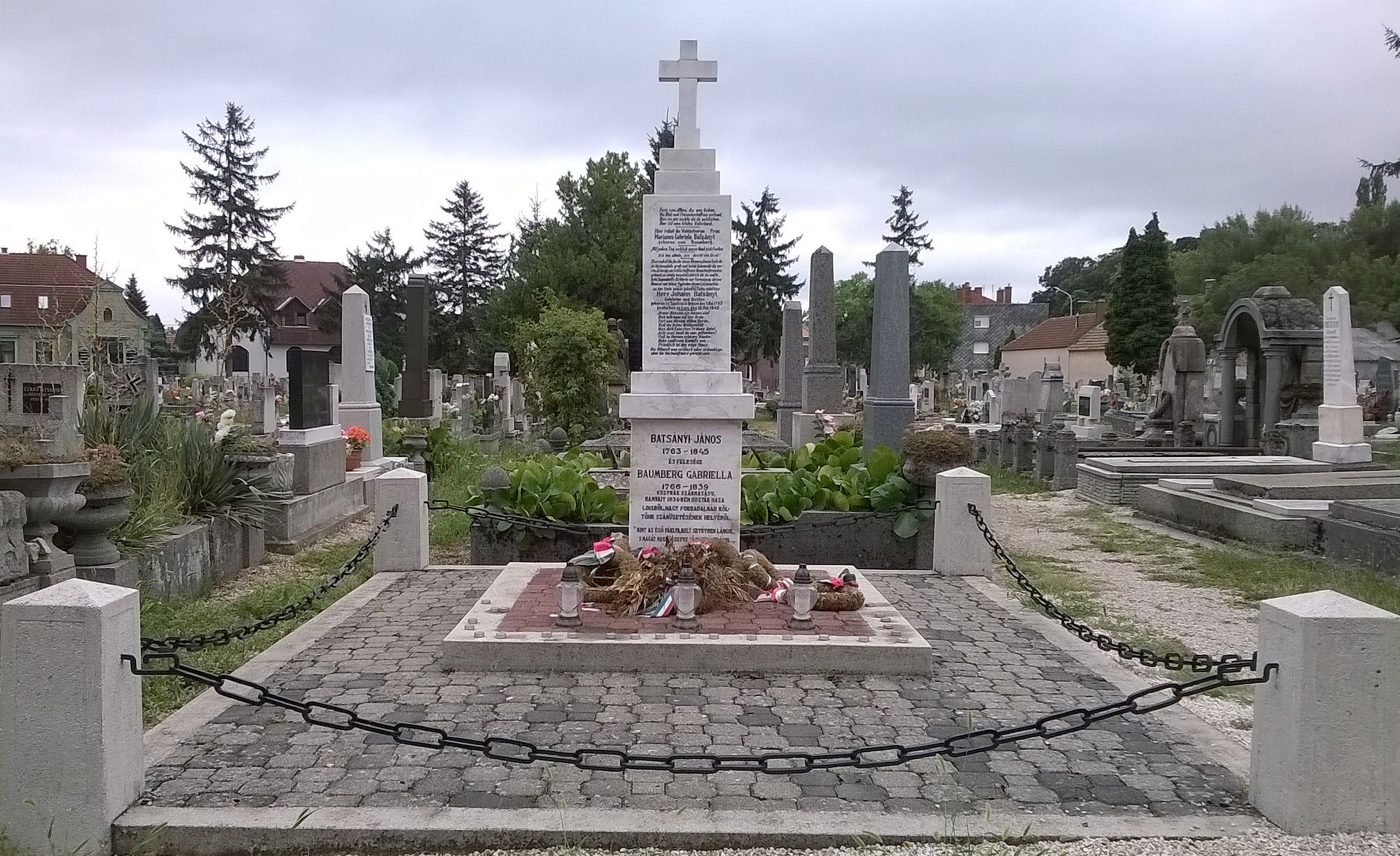 Batsányi János és felesége, Baumberg Gabriella nyughelye Tapolcán, a régi temetőben